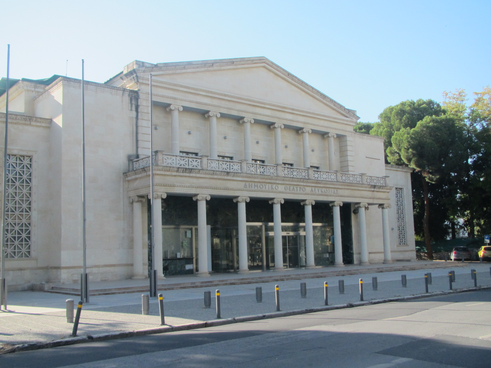 Nicosia by Paride